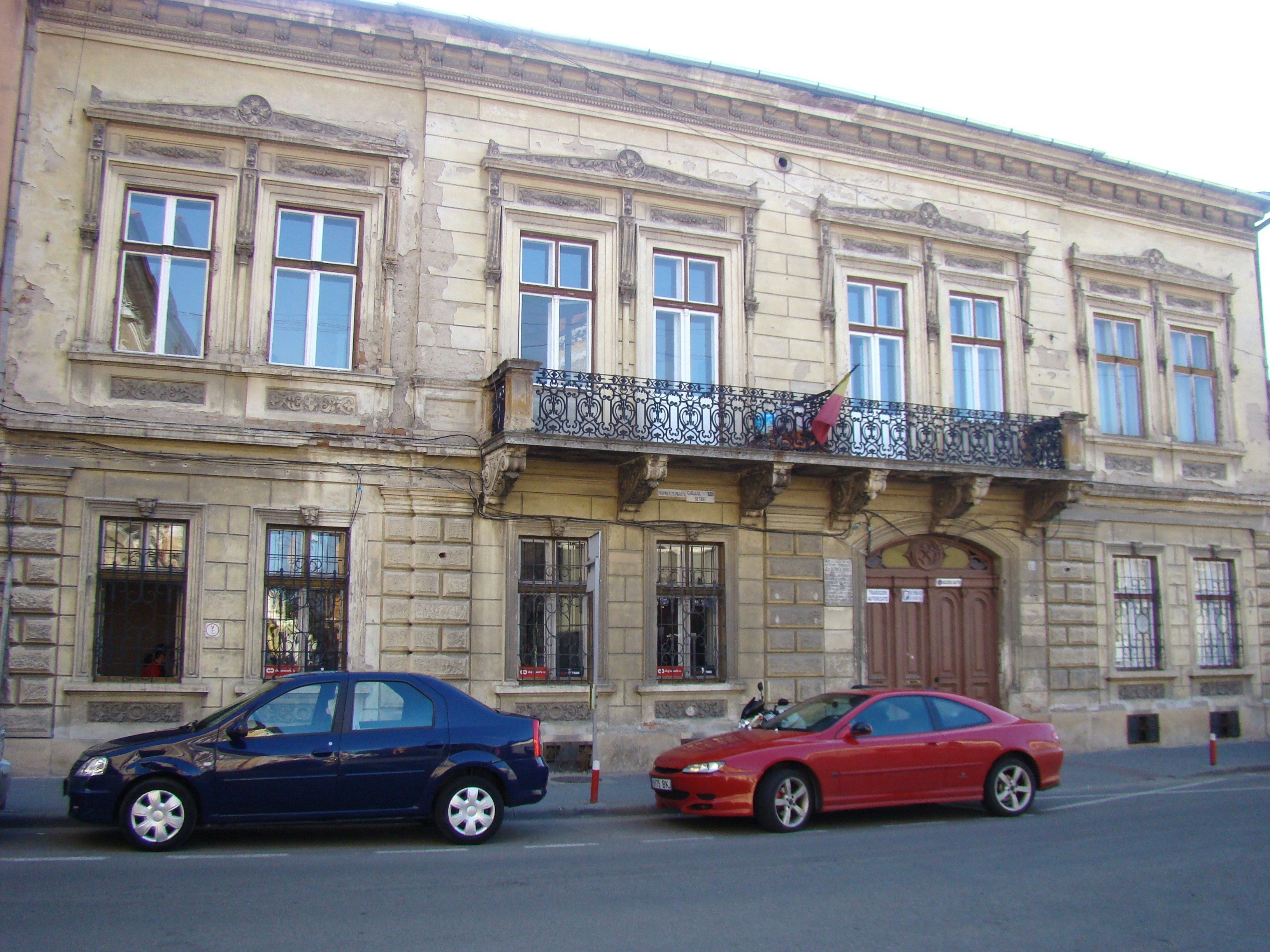 Casă monument, str.Emil Isac, nr.23